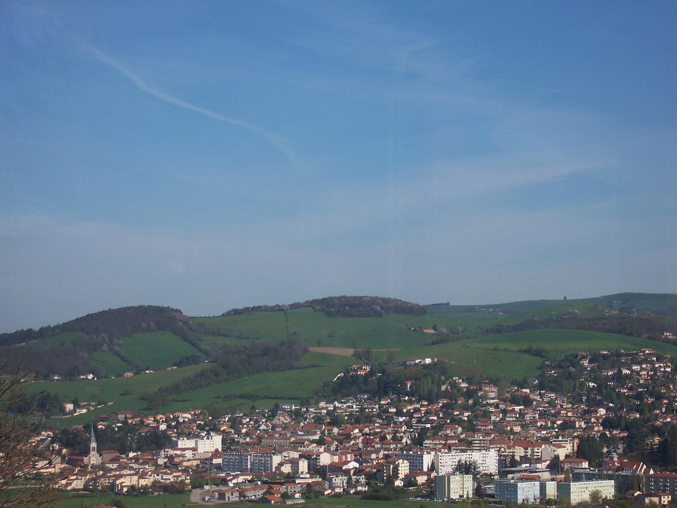 Vue de la commune de La Talaudiere